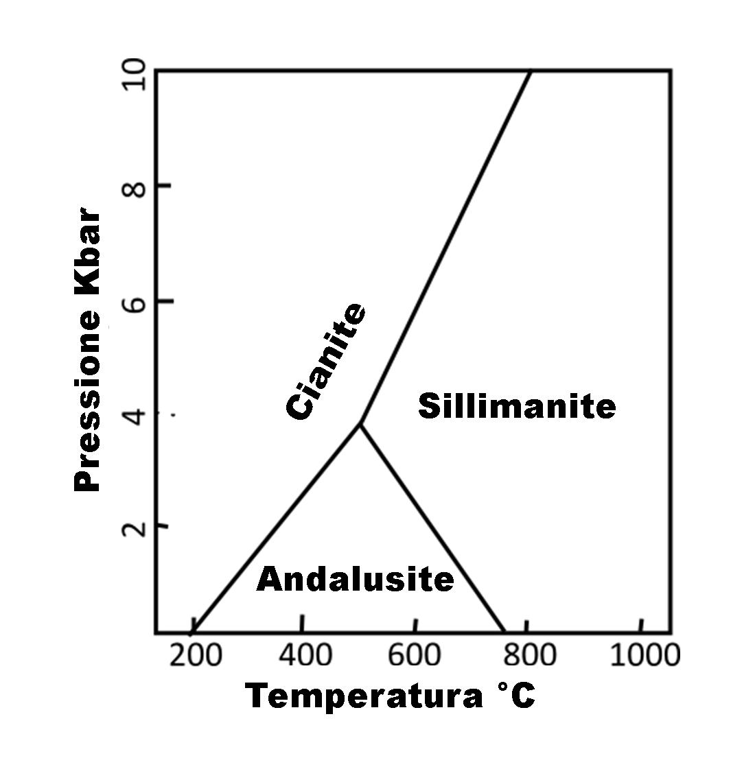 Diagramma difase Al2SiO5 cianite-sillimanite-andalusite